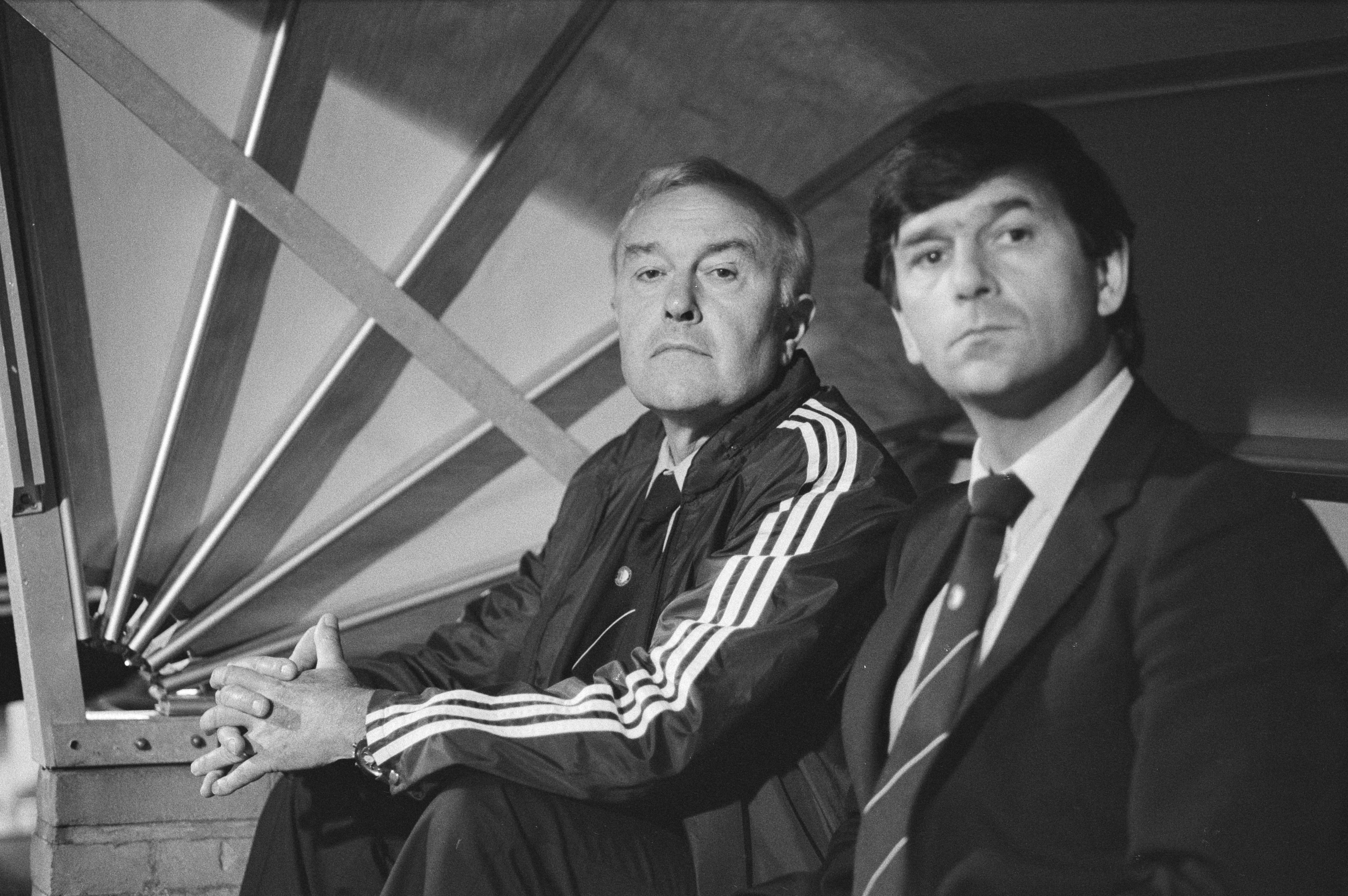 Collectie / Archief : Fotocollectie Anefo Reportage / Serie : A.s. woensdag speelt Feyenoord tegen Szombierki Byton Beschrijving : Feyenoord-trainer Jezek (links) en hulptrainer Westerhof tijdens de wedstrijd afgelopen zaterdag Datum : 14 september 1981 Locatie : Rotterdam, Zuid-Holland Trefwoorden : Feyenoord, portretten, sport, trainers, voetballen Persoonsnaam : Jezek, Václav, Westerhof, Hans Fotograaf : Antonisse, Marcel / Anefo Auteursrechthebbende : Nationaal Archief Materiaalsoort : Negatief (zwart/wit) Nummer archiefinventaris : bekijk toegang 2.24.01.05 Bestanddeelnummer : 931-6796